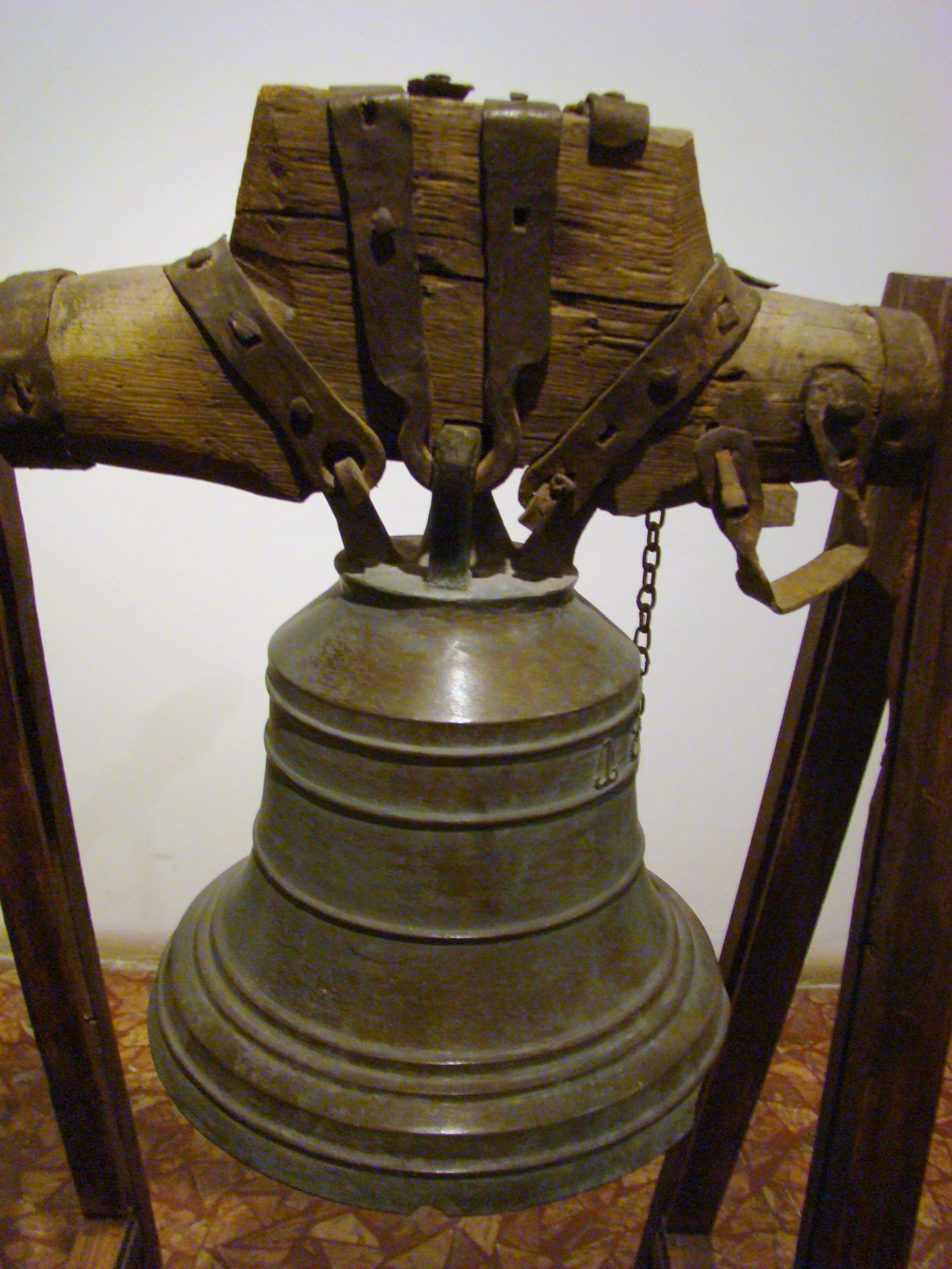 Biserica de lemn din Mintia, Hunedoara, mutată în incinta Muzeului Țăranului Român din București